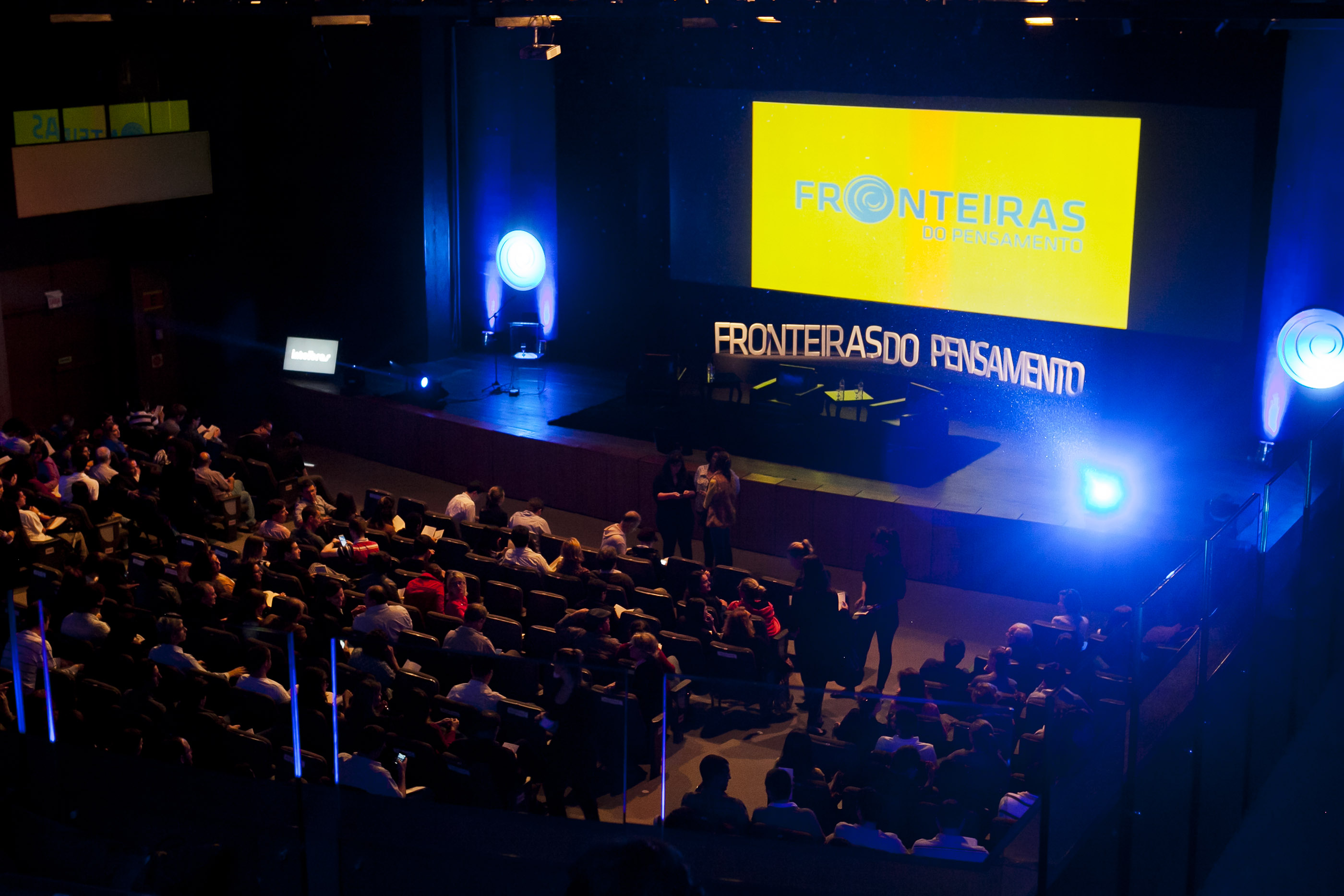 Data: 25, 26 e 27 de agosto de 2014 Local: Teatro Pedro Ivo - Florianópolis Crédito: José Luiz Somensi